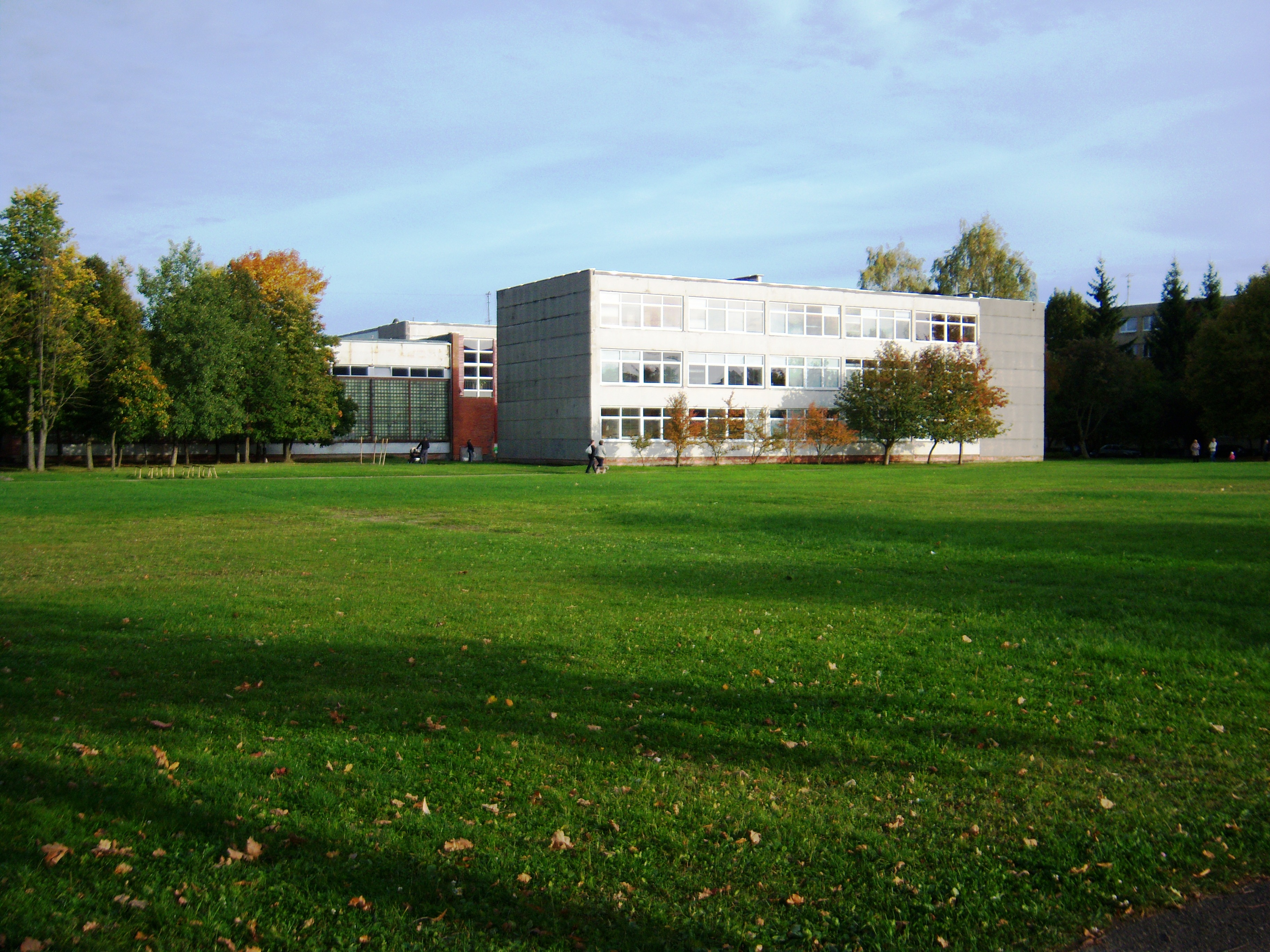 Kauno Žiburio pagrindinė mokykla